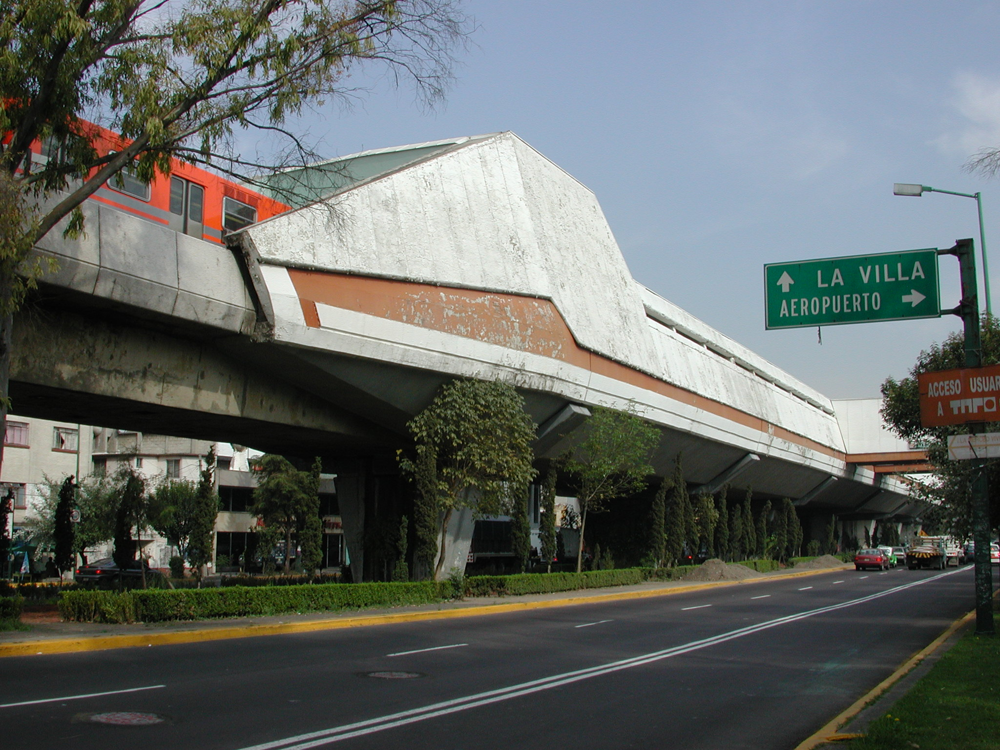 Estación del metro Fray Servando en la Ciudad de México, own work.